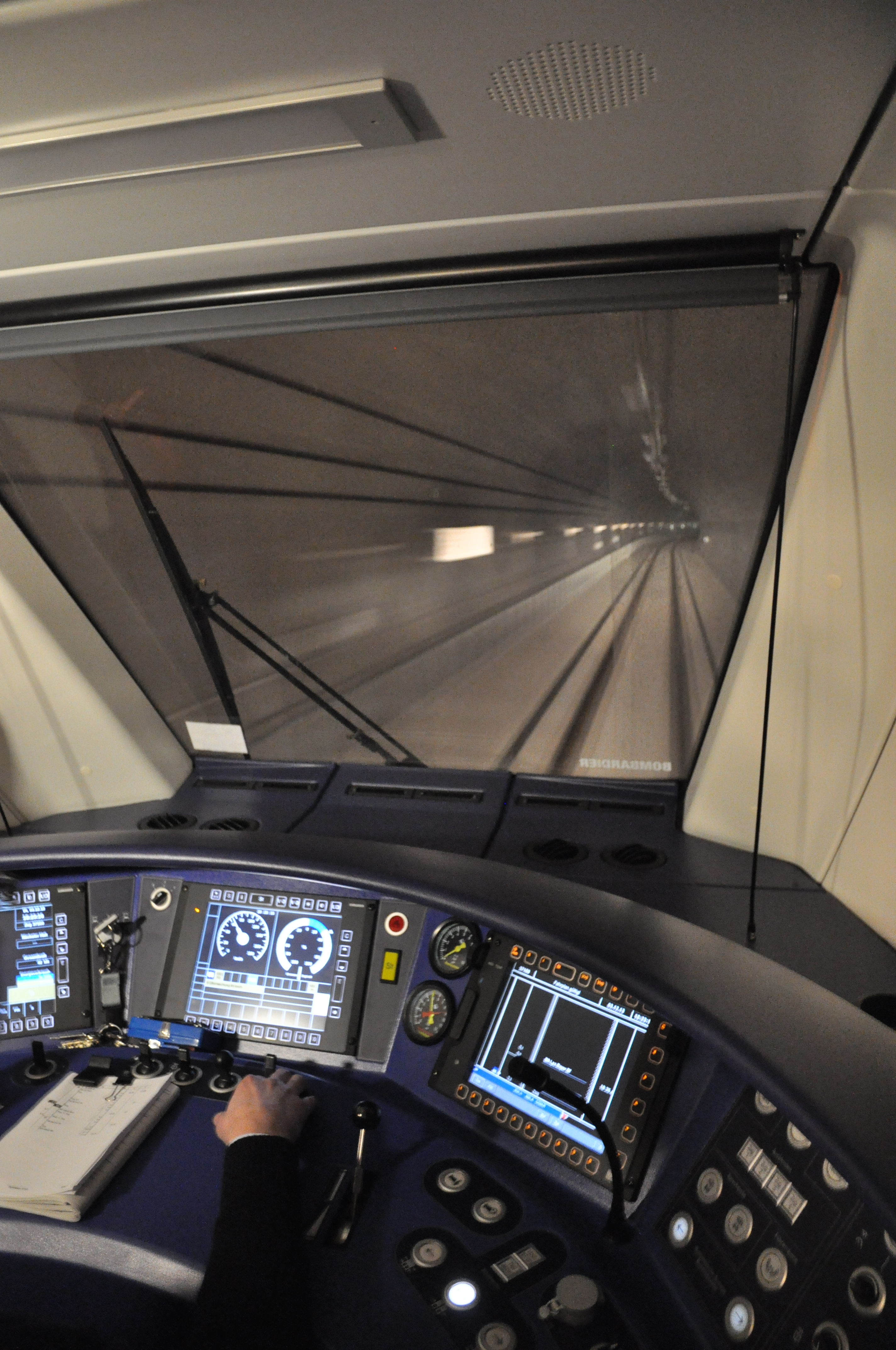 Mitfahrt im Führerstand eines Talent 2 der S-Bahn Mitteldeutschland (1442 624) zwischen den Stationen W.-Leuschner-Platz und Bayerischer Bahnhof im Leipziger City-Tunnel. Die Aufnahme entstand bei einer Veranstaltung für die Presse.